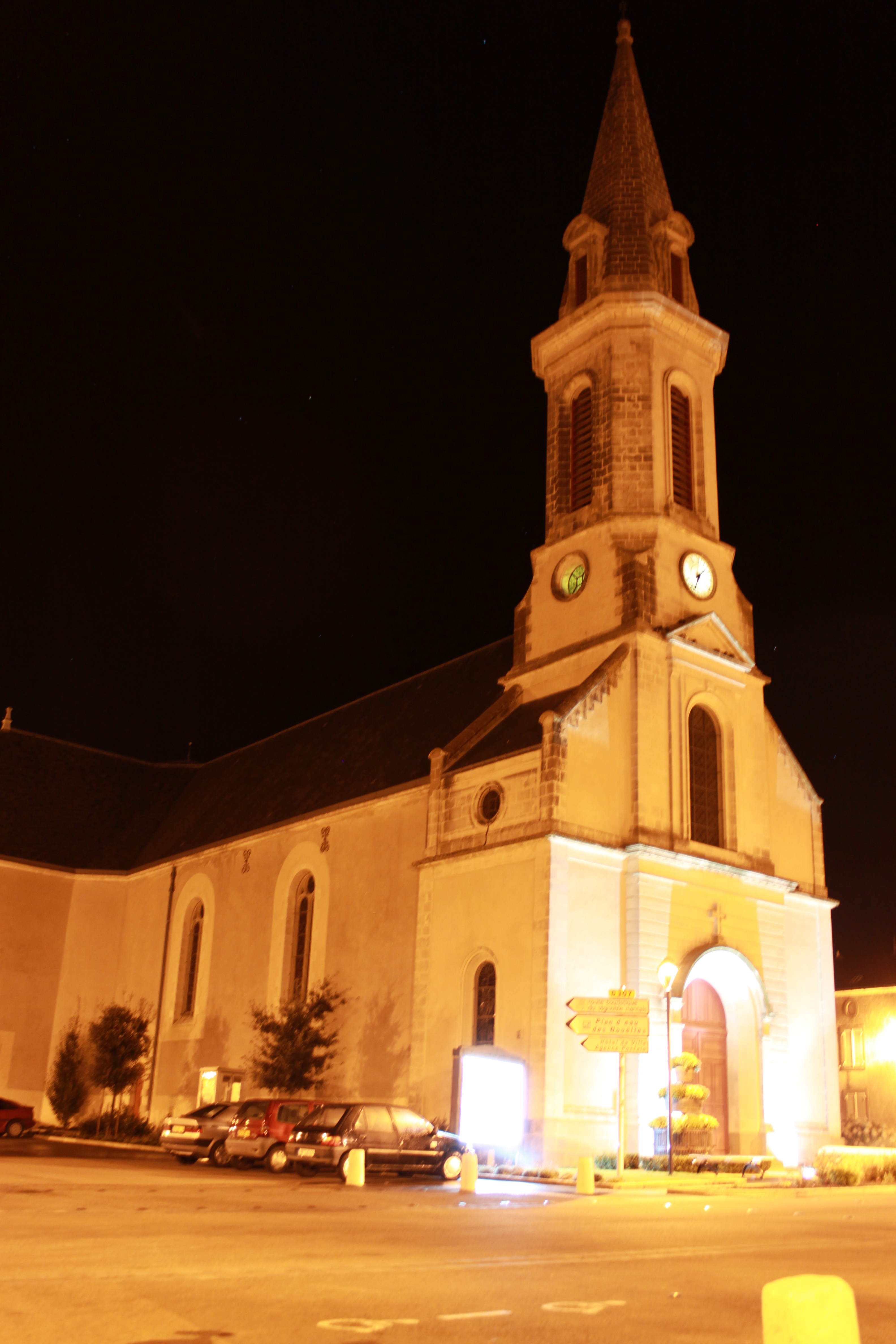 Le Landreau, Immaculée Conception, 1845-1848, Fr-44-Le Landreau.